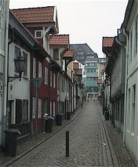 Der Oluf-Samson-Gang ist Flensburgs hist. ehemals Rotlichtbezirk; Blickrichtung auf die in der Norderstraße gelegenen Dänischen Zentralbibliothek für Südschleswig Photo: Uwe Kils; uwe kils, gfdl self